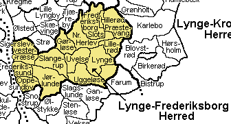 Lynge-Frederiksborg Herred Frederiksborg Amt , Denmark. Map by Svend-Erik Christiansen, edited by user:Nico-dk .